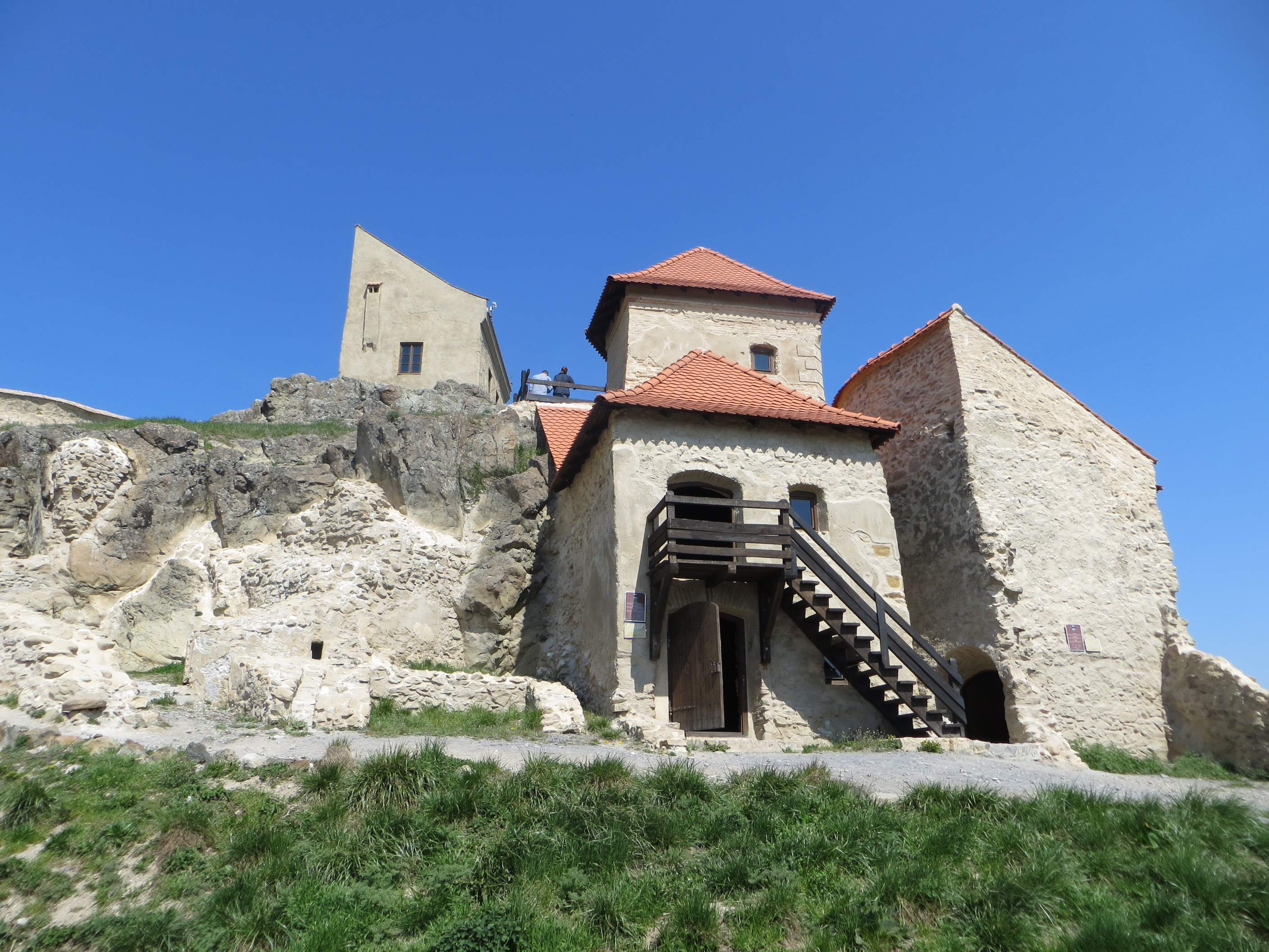 Cetatea Rupea (Cetatea Cohalmului) 01